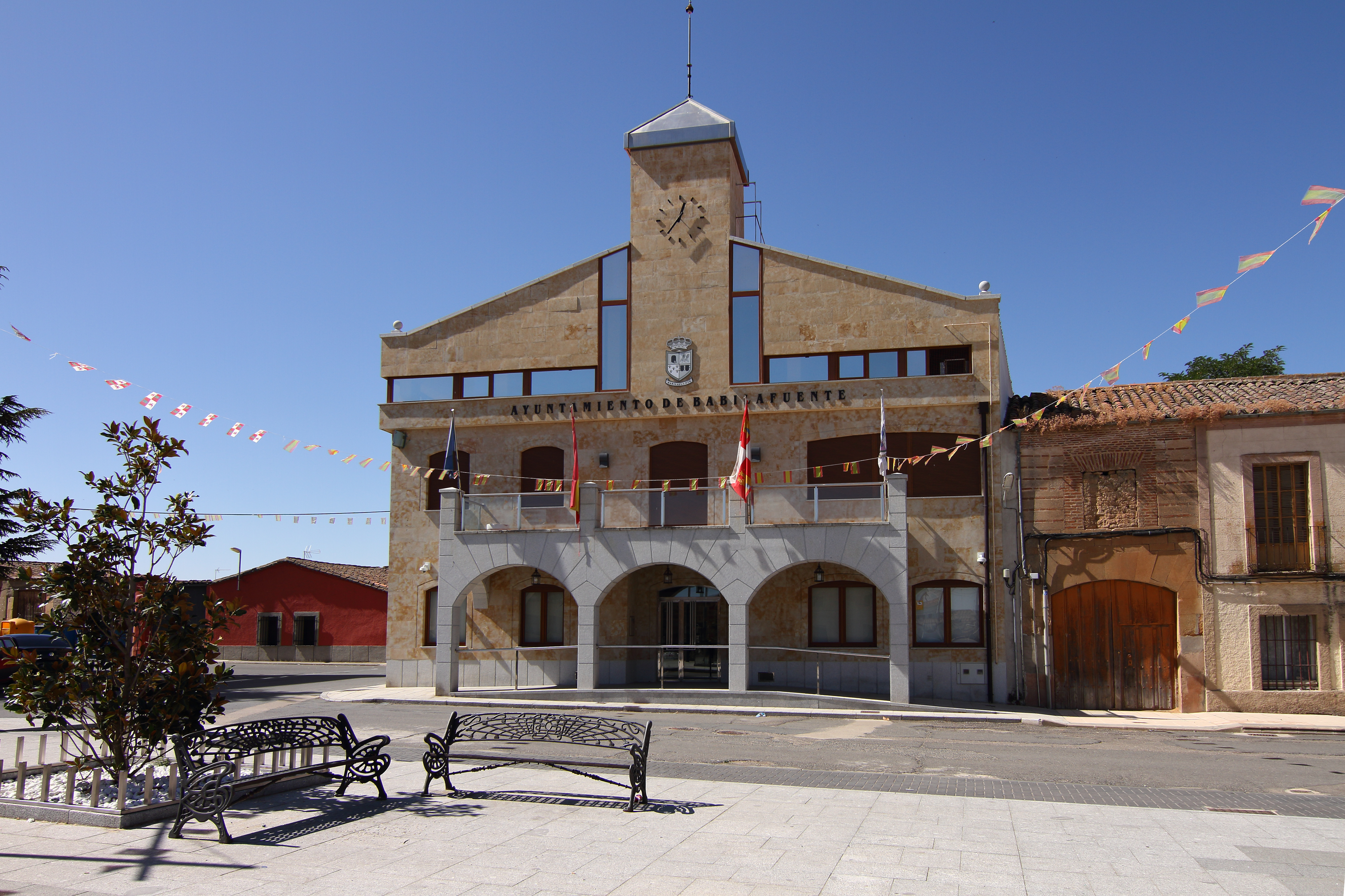 Ayuntamiento de Babilafuente